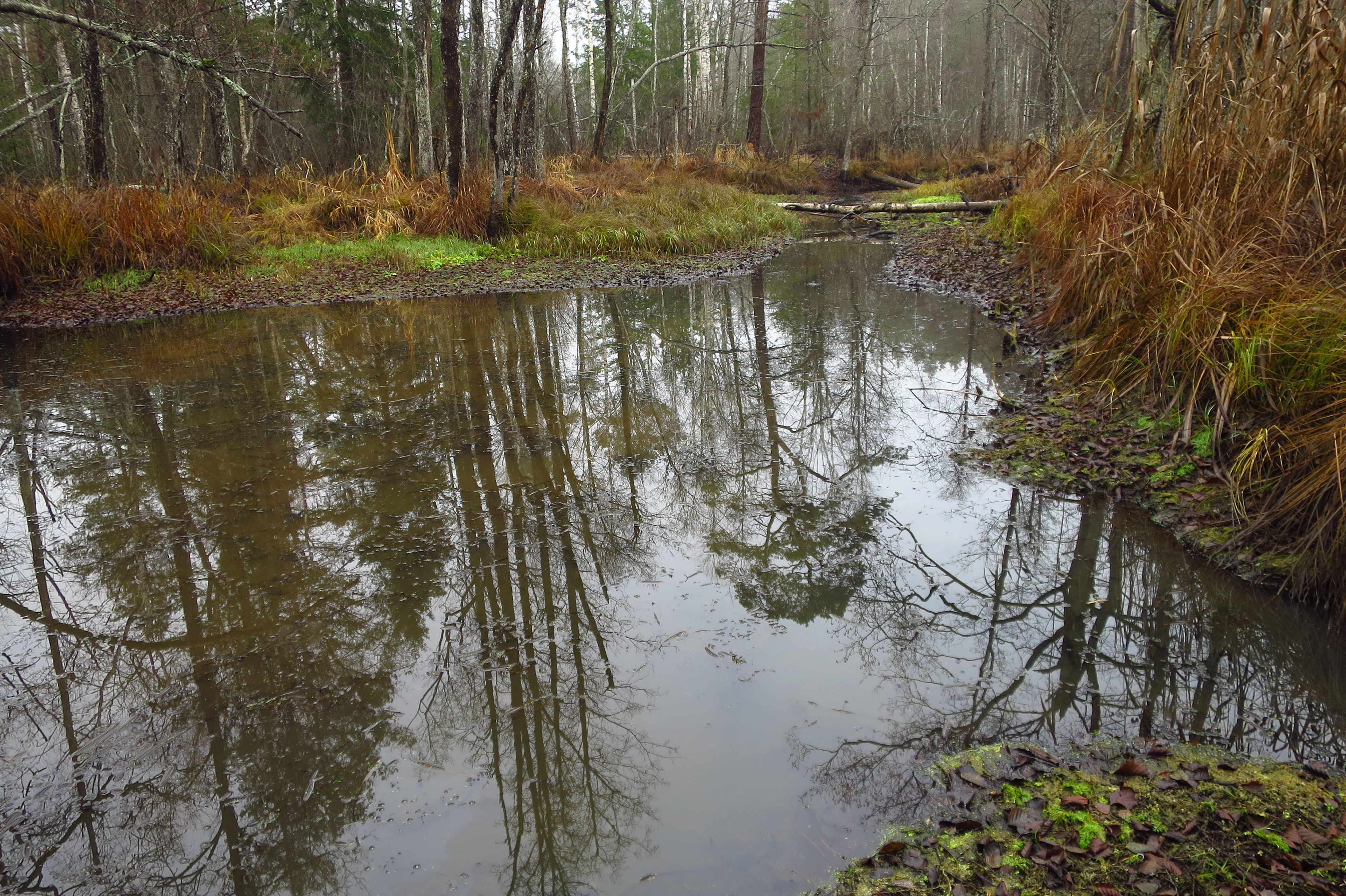 Vasavere jõgi Kurtna MKA